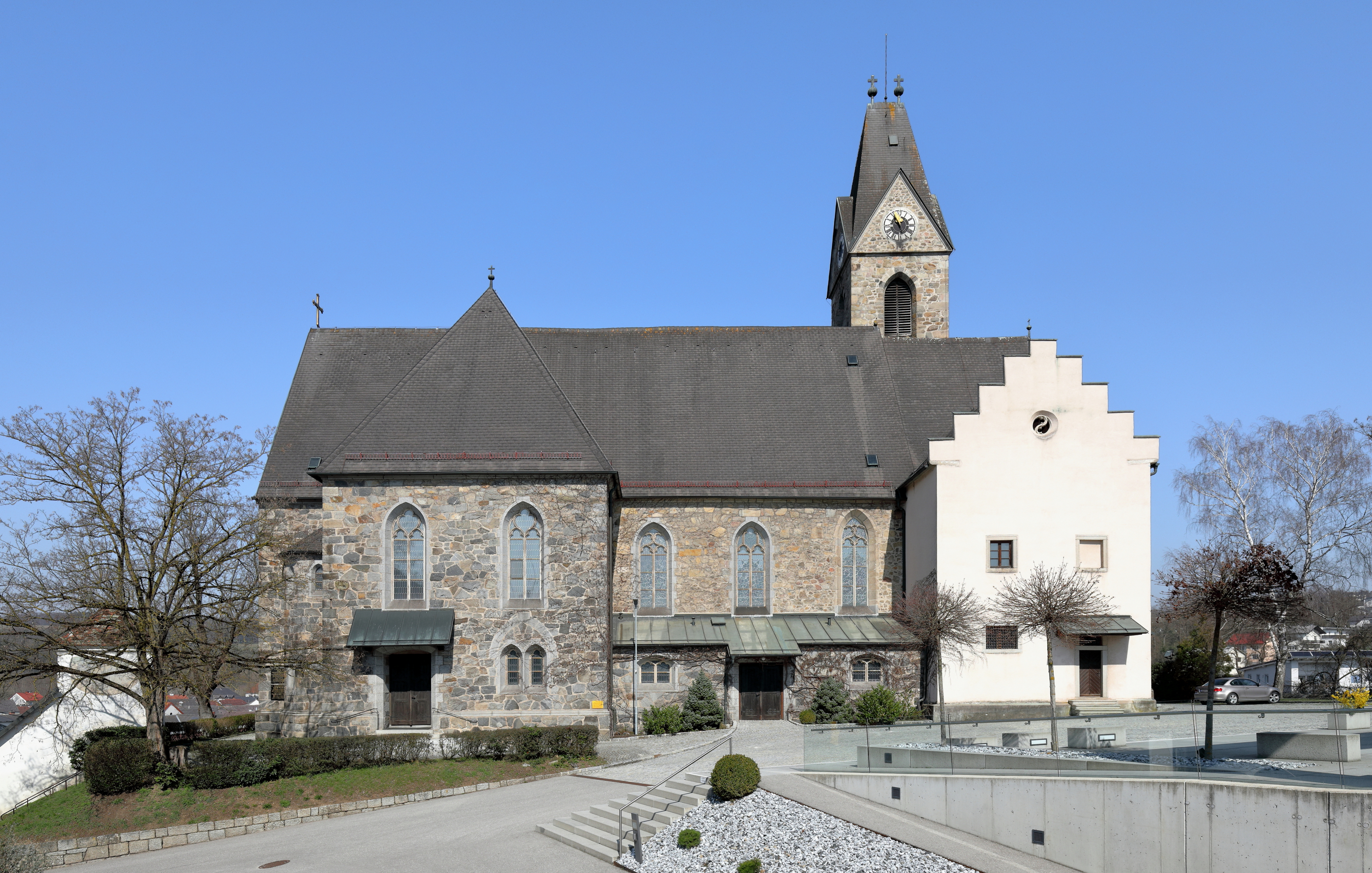 Südansicht der röm.-kath. Pfarrkirche hll. Philipp und Jakob in der oberösterreichischen Marktgemeinde Schwertberg.Die spätgotische Hallenkirche wurde um 1500 errichtet. Um 1700 erfolgte der Anbau der zweigeschossigen Sakristei. 1913/14 wurde nach Plänen von Dombaumeister Matthäus Schlager die Pfarrkirche auf die heutige Größe und Form erweitert. Der bestehenden Kirche wurde westseitig ein dreijochiger Anbau in Kreuzesform und an den beiden Längsseiten ein zweischiffiger Zubau in Fensterhöhe angefügt, sowie der Kirchturm erhöht.